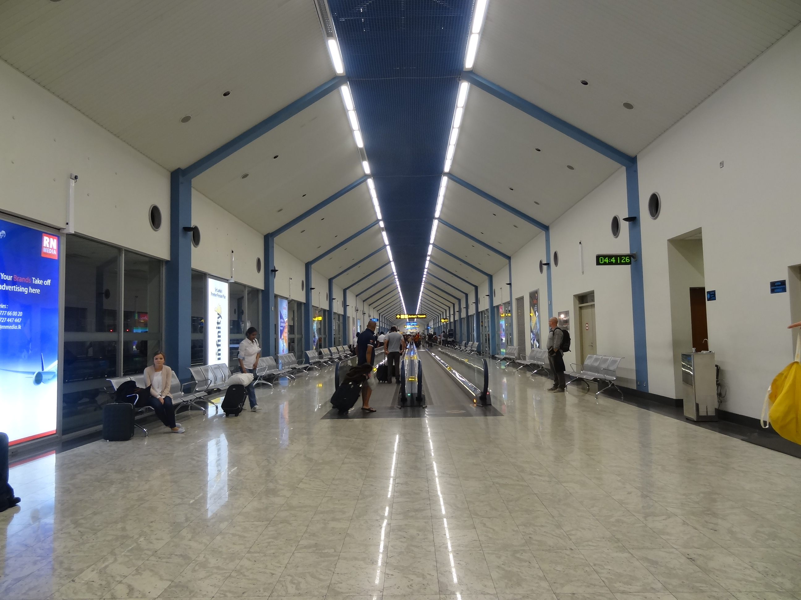 Bandaranaike International Airport